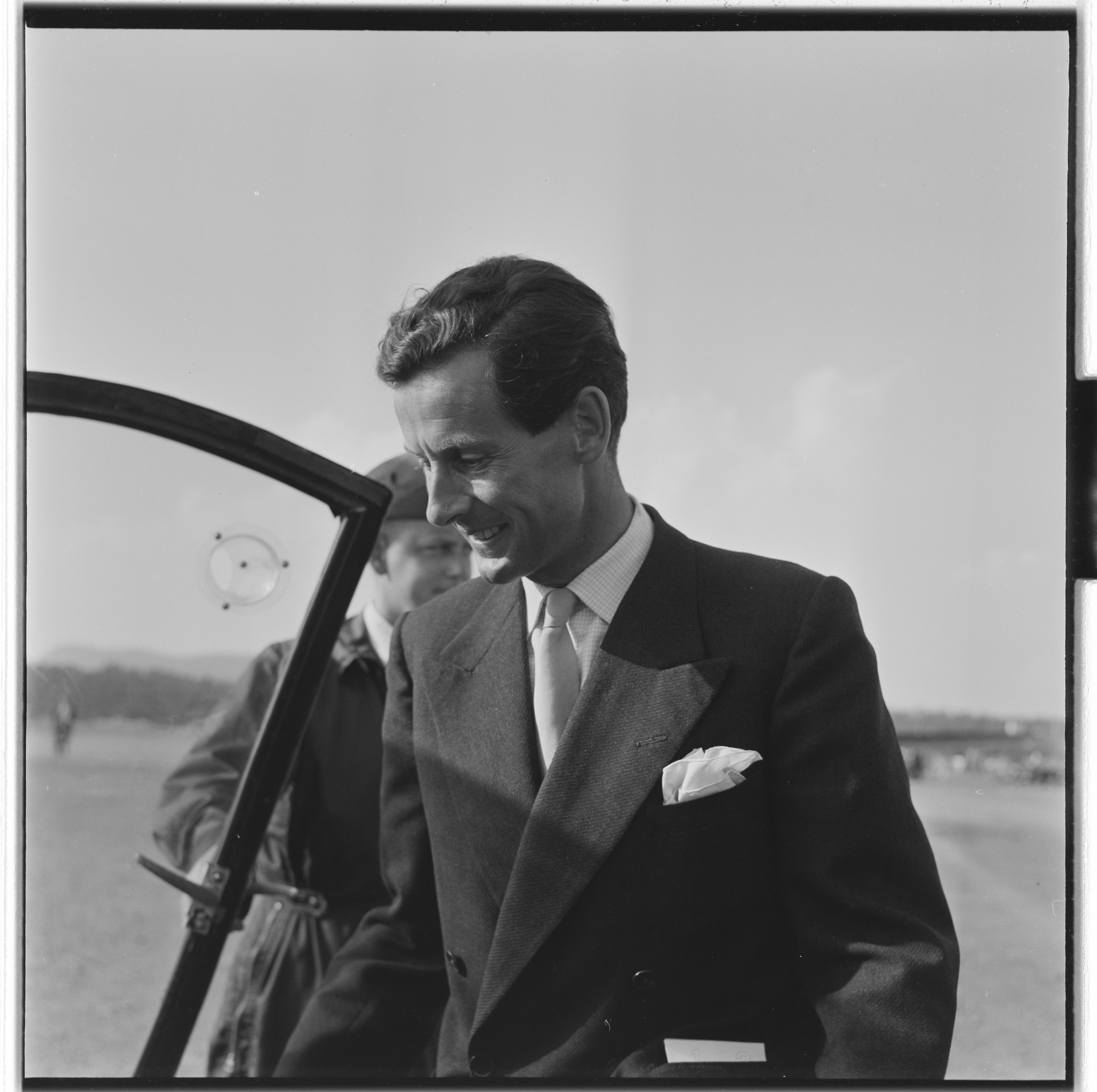 Bildet er hentet fra Arkivverket. Øvrevold. Peter Townsend. NÅ nr.- 36, 1955 Arkivinstitusjon : Riksarkivet Arkivnavn : Billedbladet NÅ Sted : Norge, Akershus, Bærum, Fornebu Emneord: hestesport, jockey Avbildet: Townsend, Peter